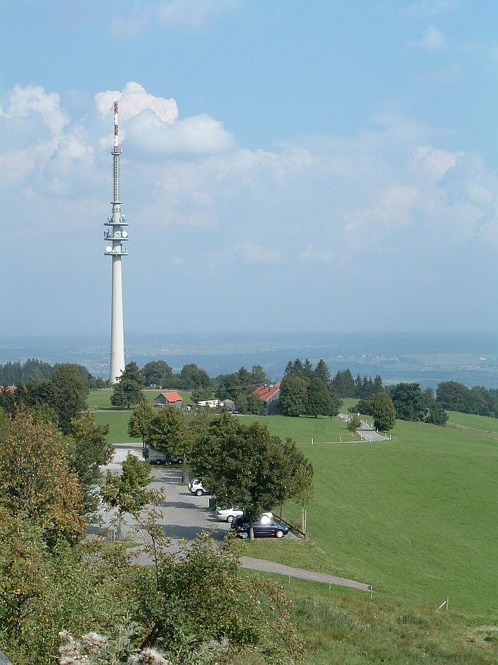 Sendeanlage auf dem Hohen Peißenberg